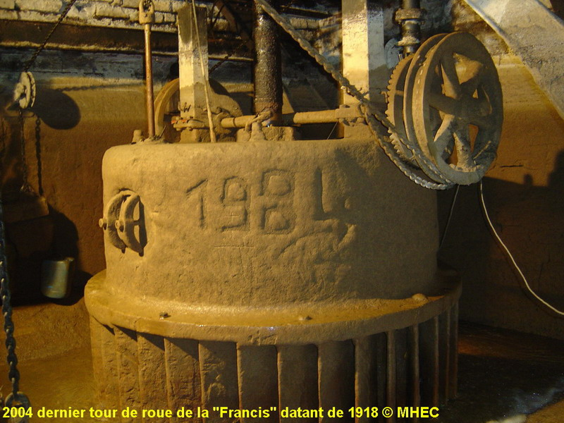 Turbine Francis de type Singrûn (118 kW)installée dans le moulin de Chappes (10260)en 1918